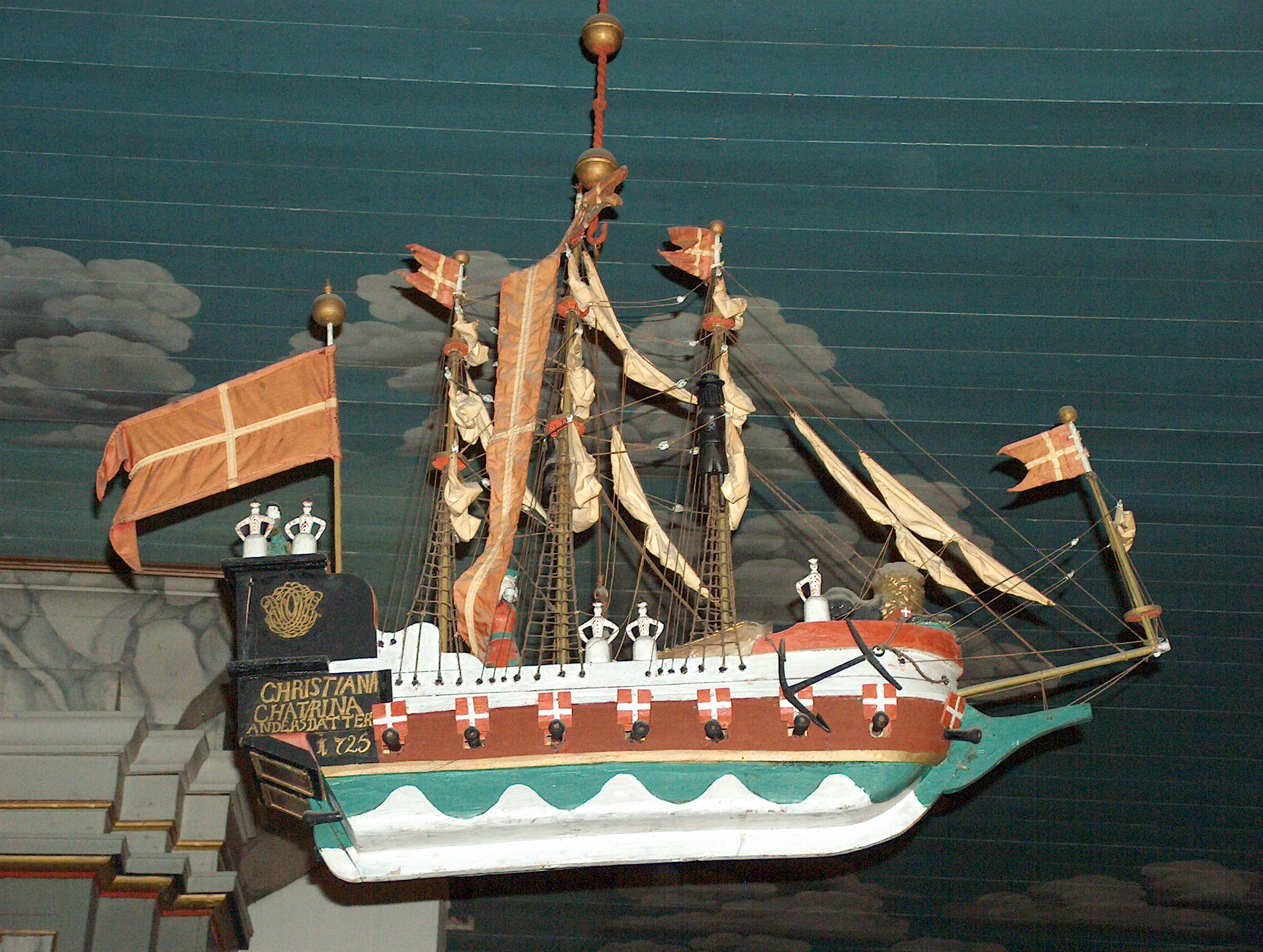 Lunder kirke, Sokna (kirkeskip 2, 1725)